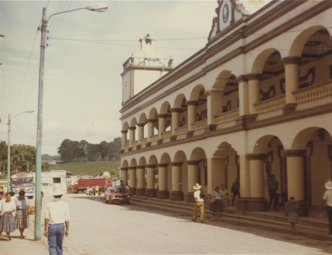 San Pedro Carcha, Alta Verapaz, Guatemala. Municipal palace at right.